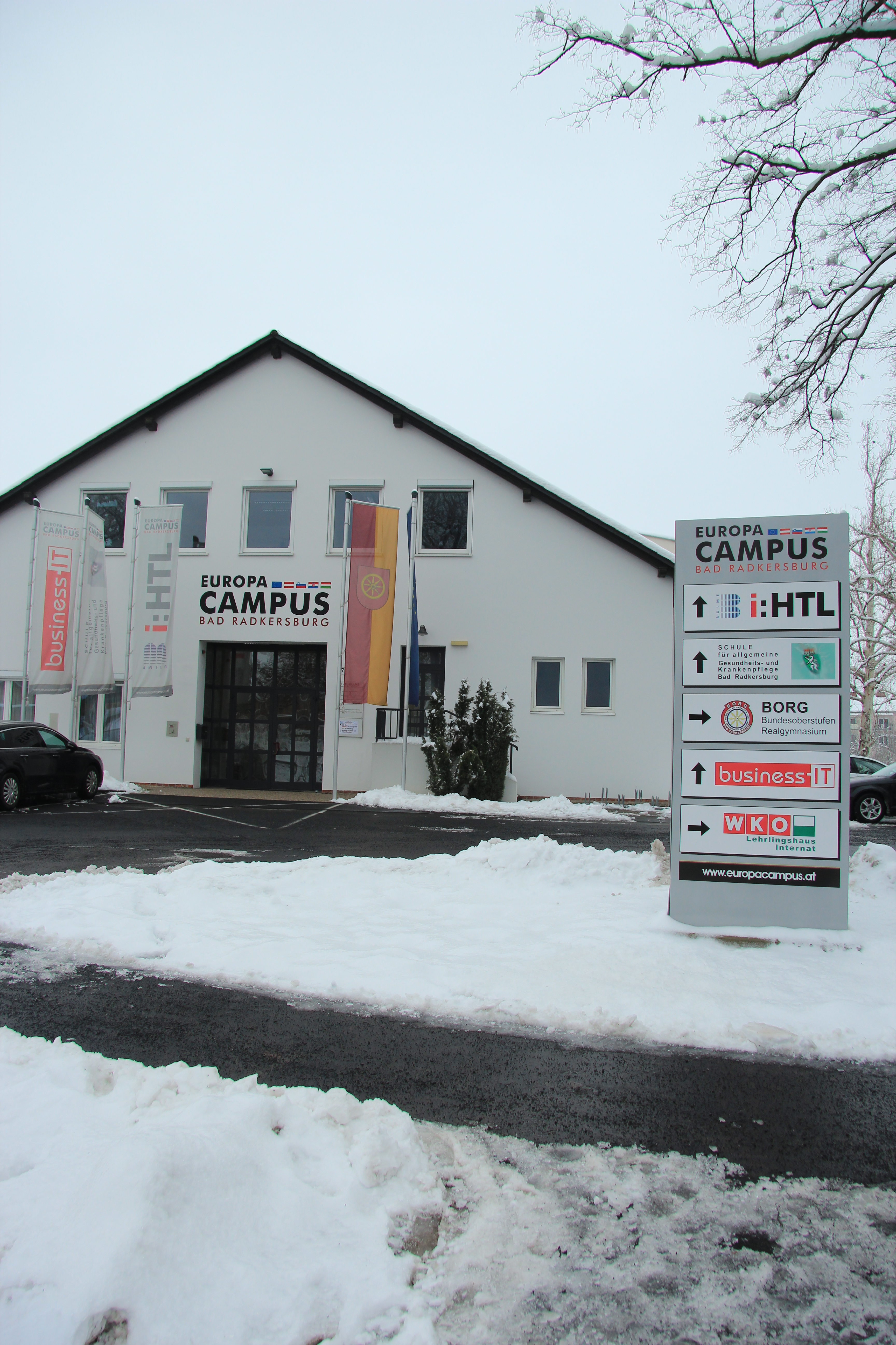 Schulzentrum in Bad Radkersburg